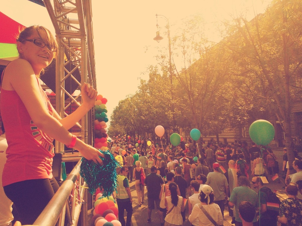 Budapest Pride Festival 2013